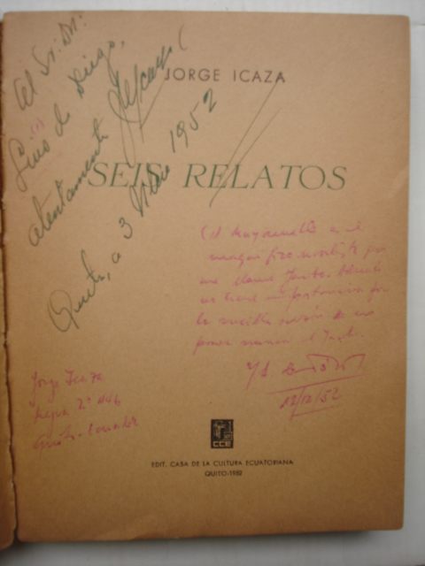 Página de un ejemplar de Seis relatos (Quito: Casa de la Cultura Ecutatoriana, 1952) dedicada y firmada por su autor, Jorge Icaza Coronel